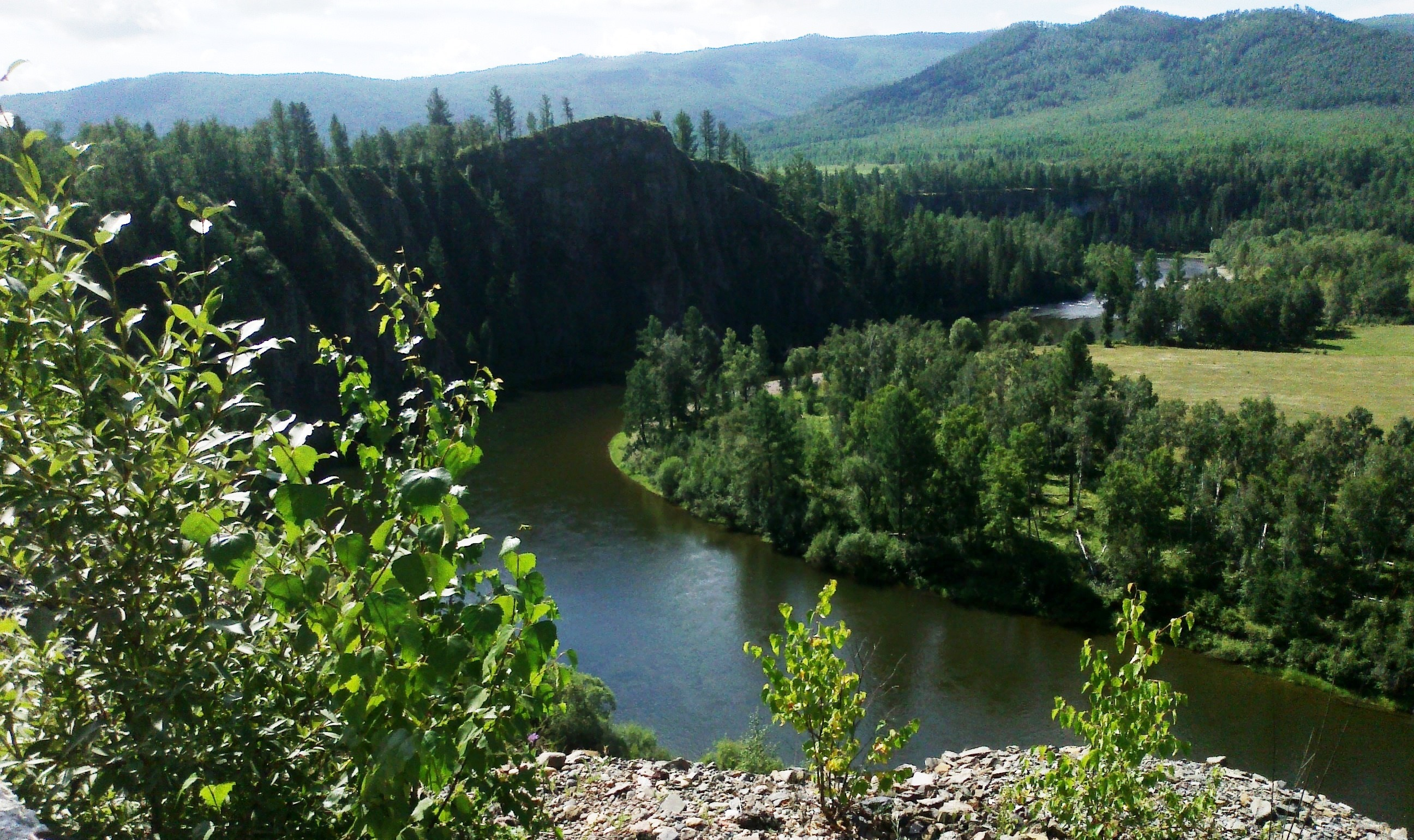 Dzhida River. Zakamensky district, Buryatia